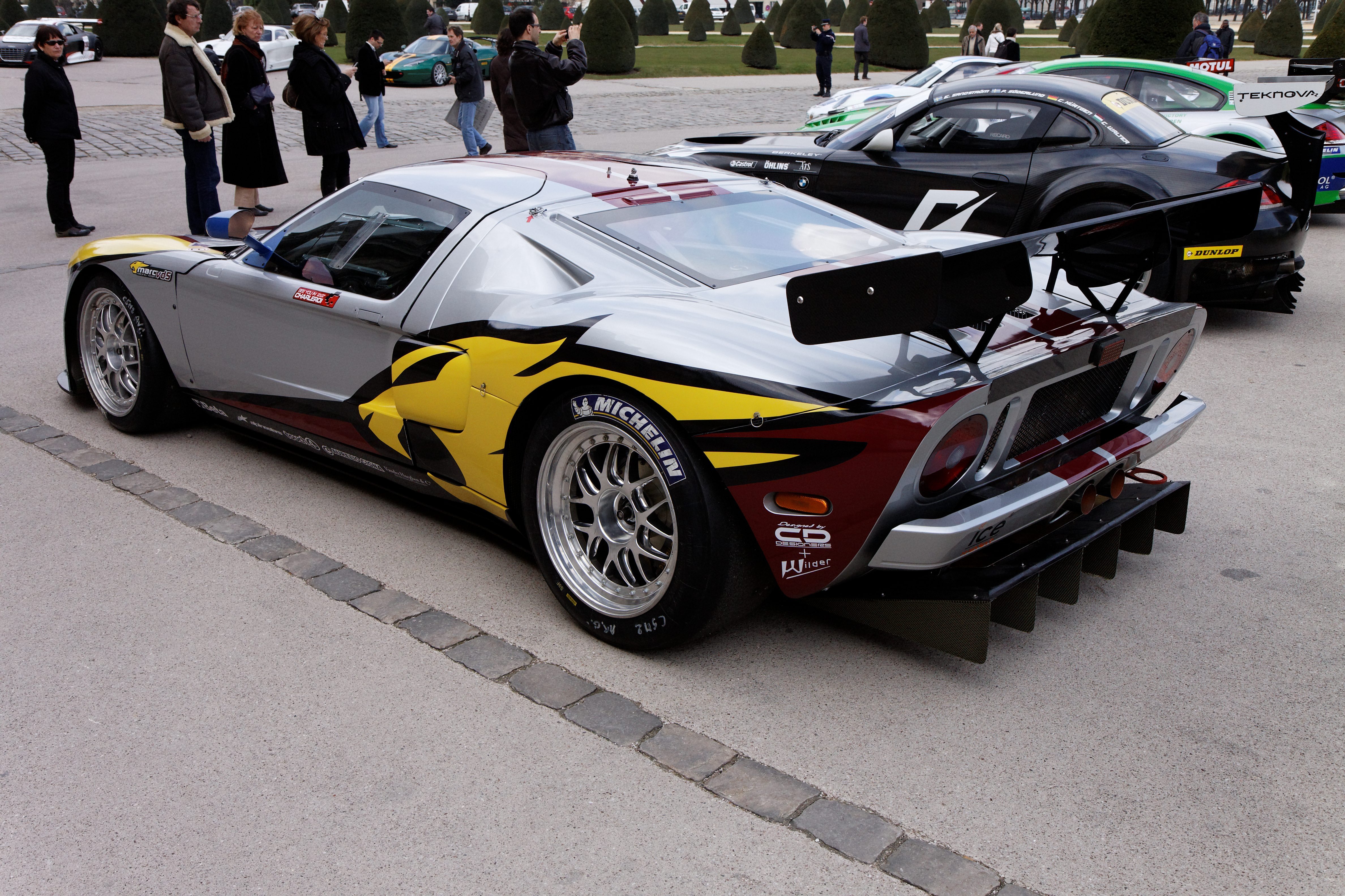 Photographie prise lors de la présentation du Blancpain Endurance series aux Invalides à Paris en mars 2011.